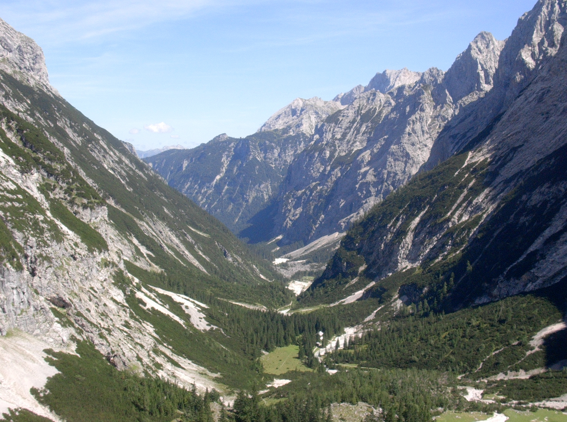 Oberes Reintal beim Abstieg vom Zugspitzblatt (von W) mit Reintalangerhütte und Schachenhaus (6 Tage nach der Zerstörung der Vorderen Blauen Gumpe am 23. August 2005)